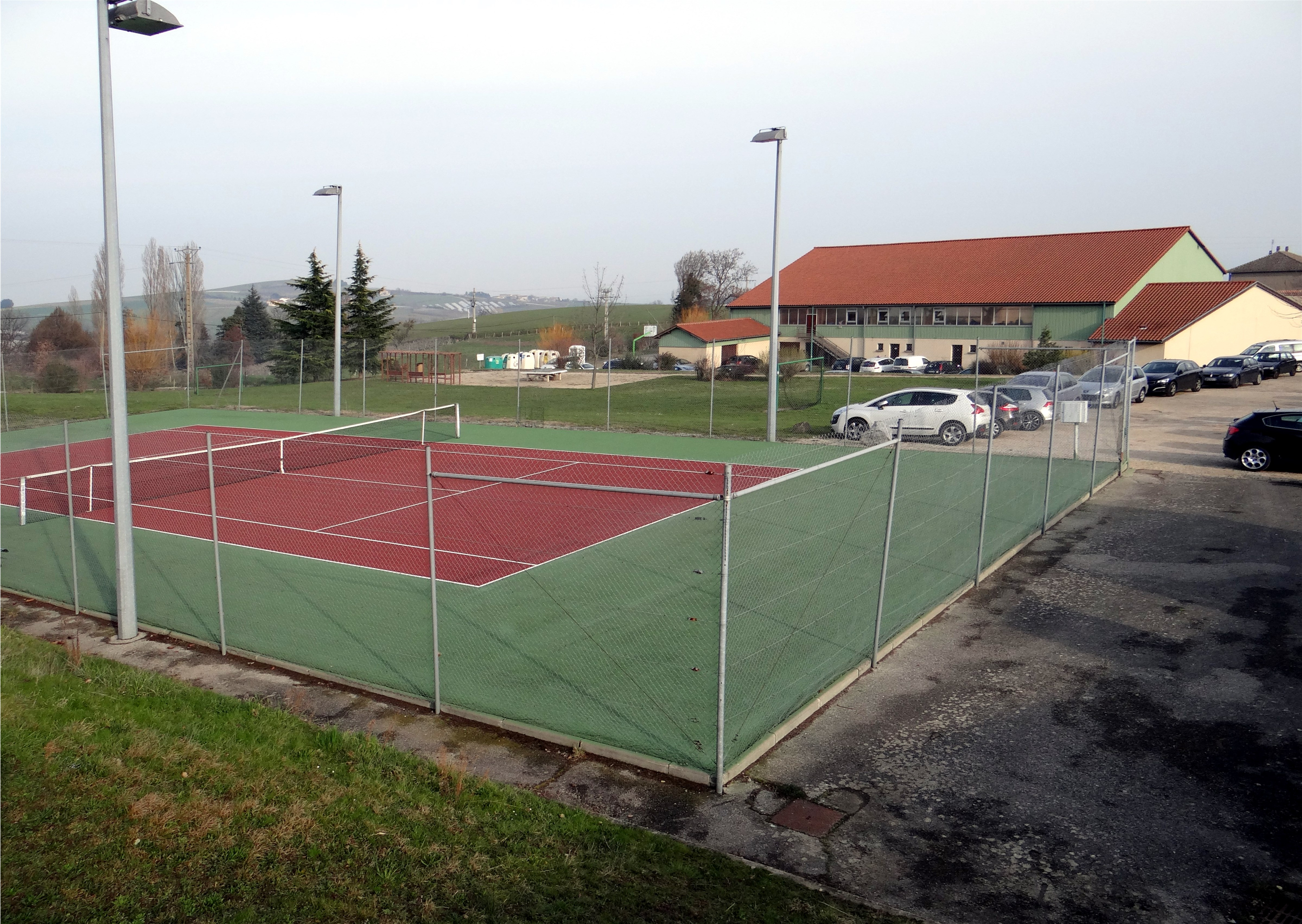 Le cours de tennis et le gymnase, Saint-Didier-sous-Riverie, Rhône, France.